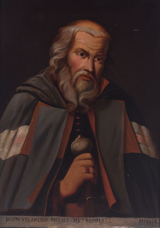 Беларуская (тарашкевіца): Партрэт Язэпа Руцкага (Jazep Rucki)